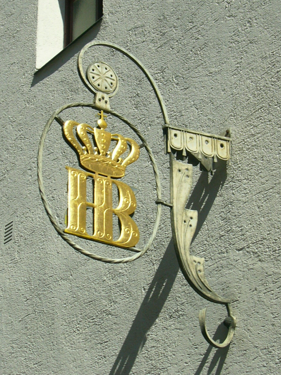 Hofbräu-Logo am Hofbräuhaus am Platzl in München, Bräuhausstr. (Altstadt)